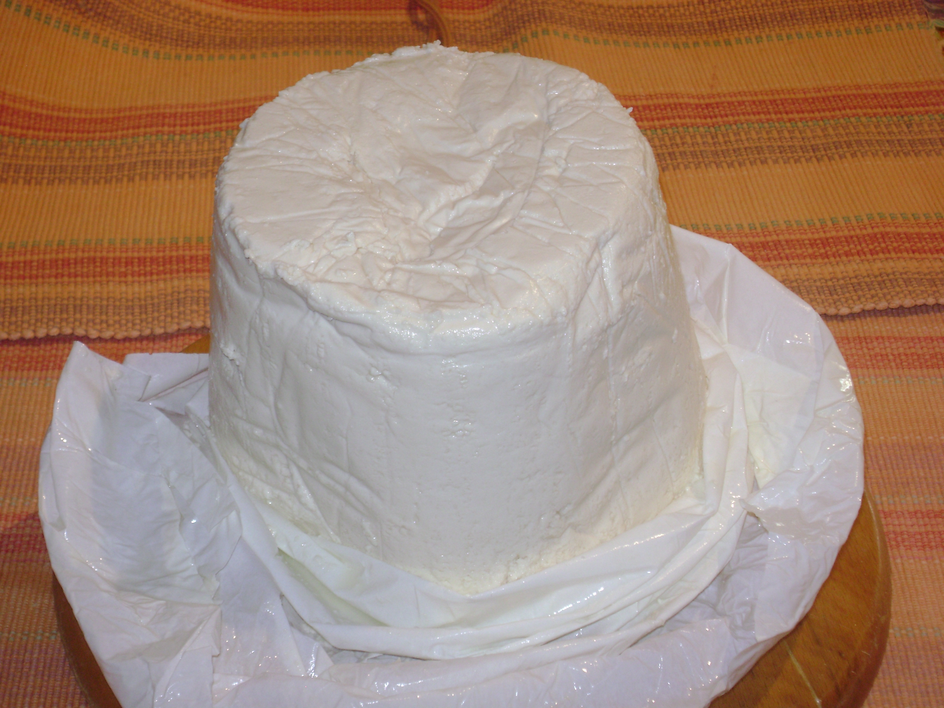 Mvskoke: Ανθότυρος